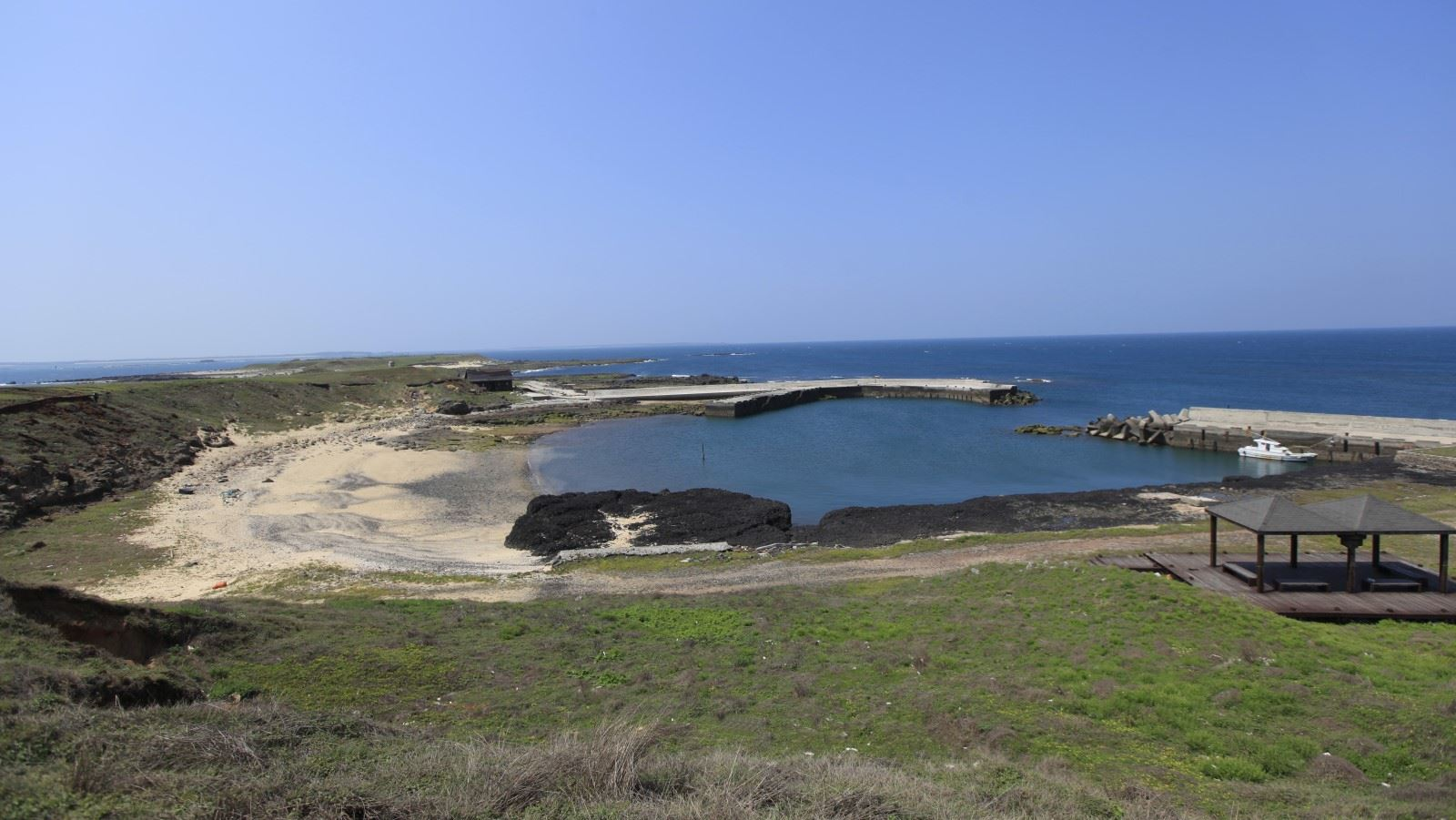 中文（台灣）: 姑婆嶼港口